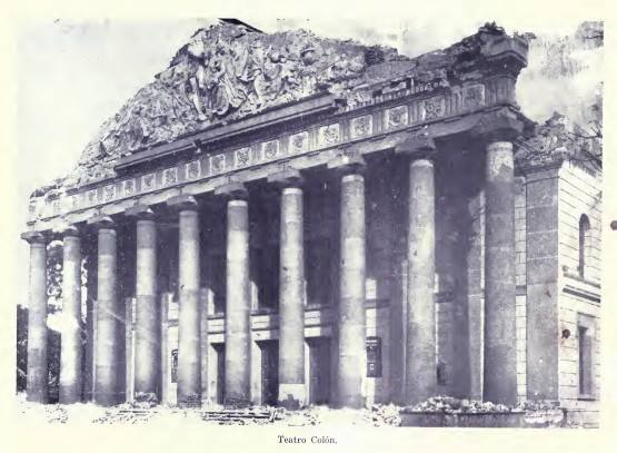 Teatro Colon tras los terremotos de 1917-1918.